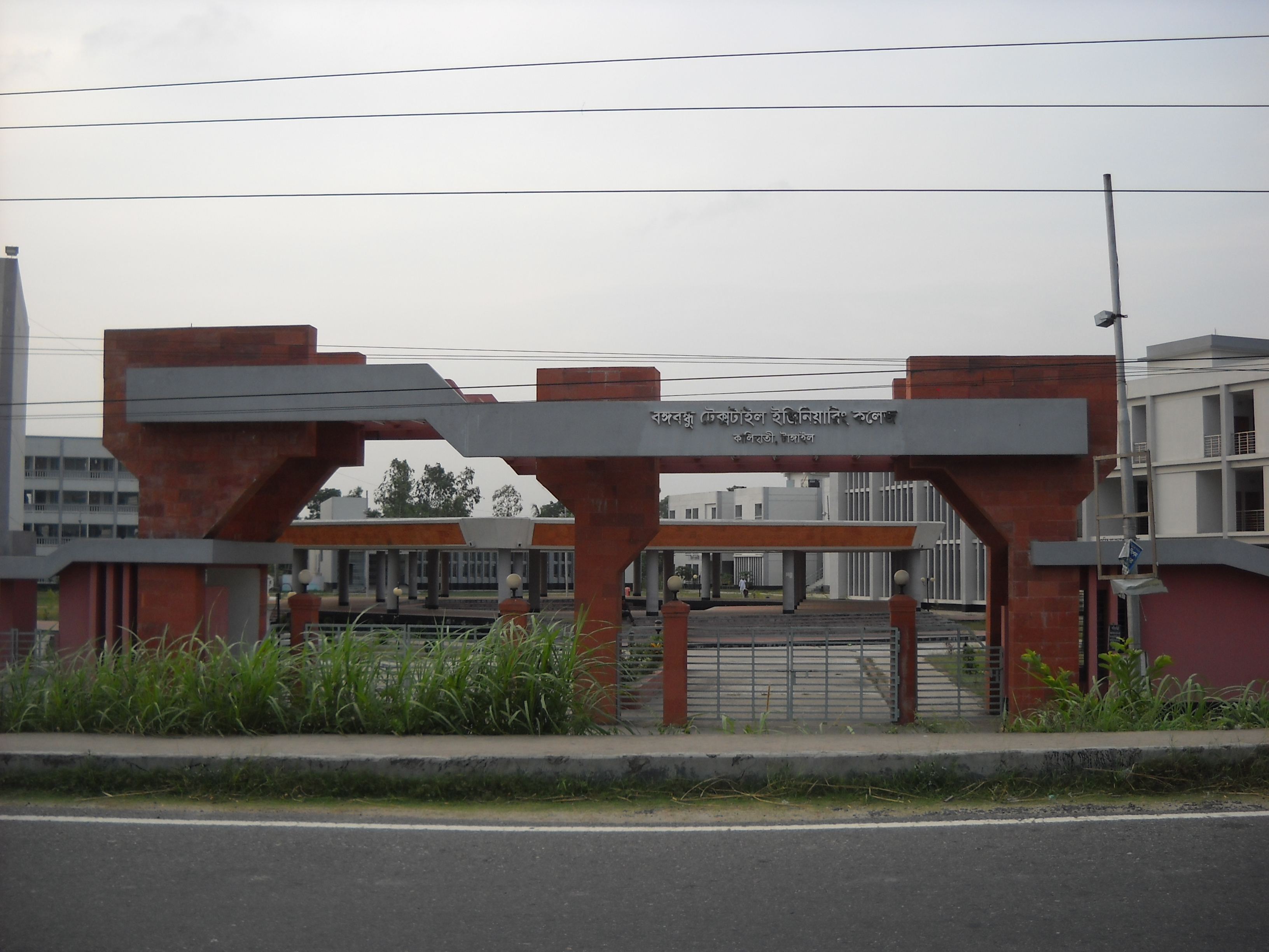 বঙ্গবন্ধু টেক্সটাইল ইঞ্জিনিয়ারিং কলেজ